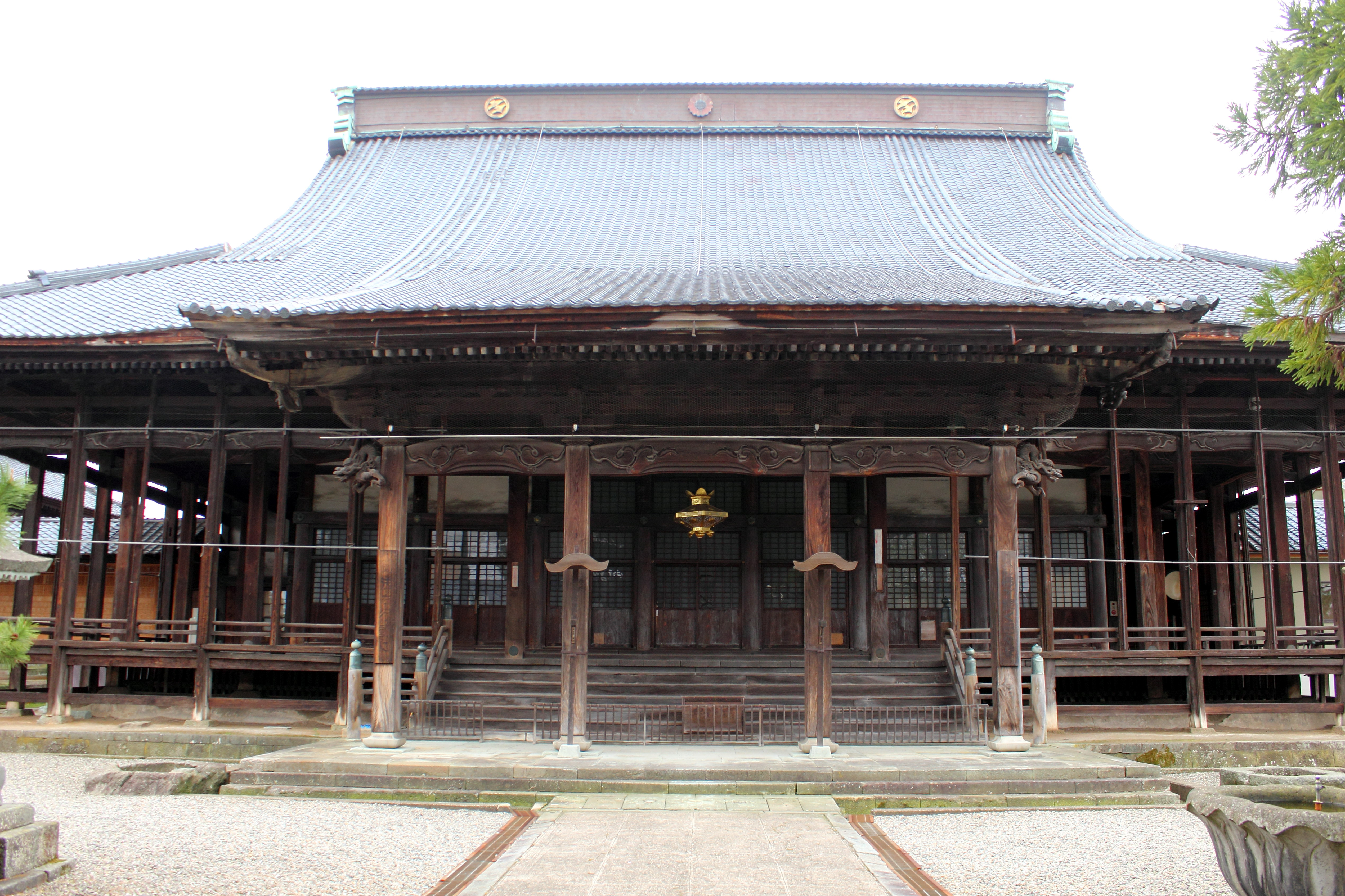 専照寺 御影堂 1838年（天保9年）再建